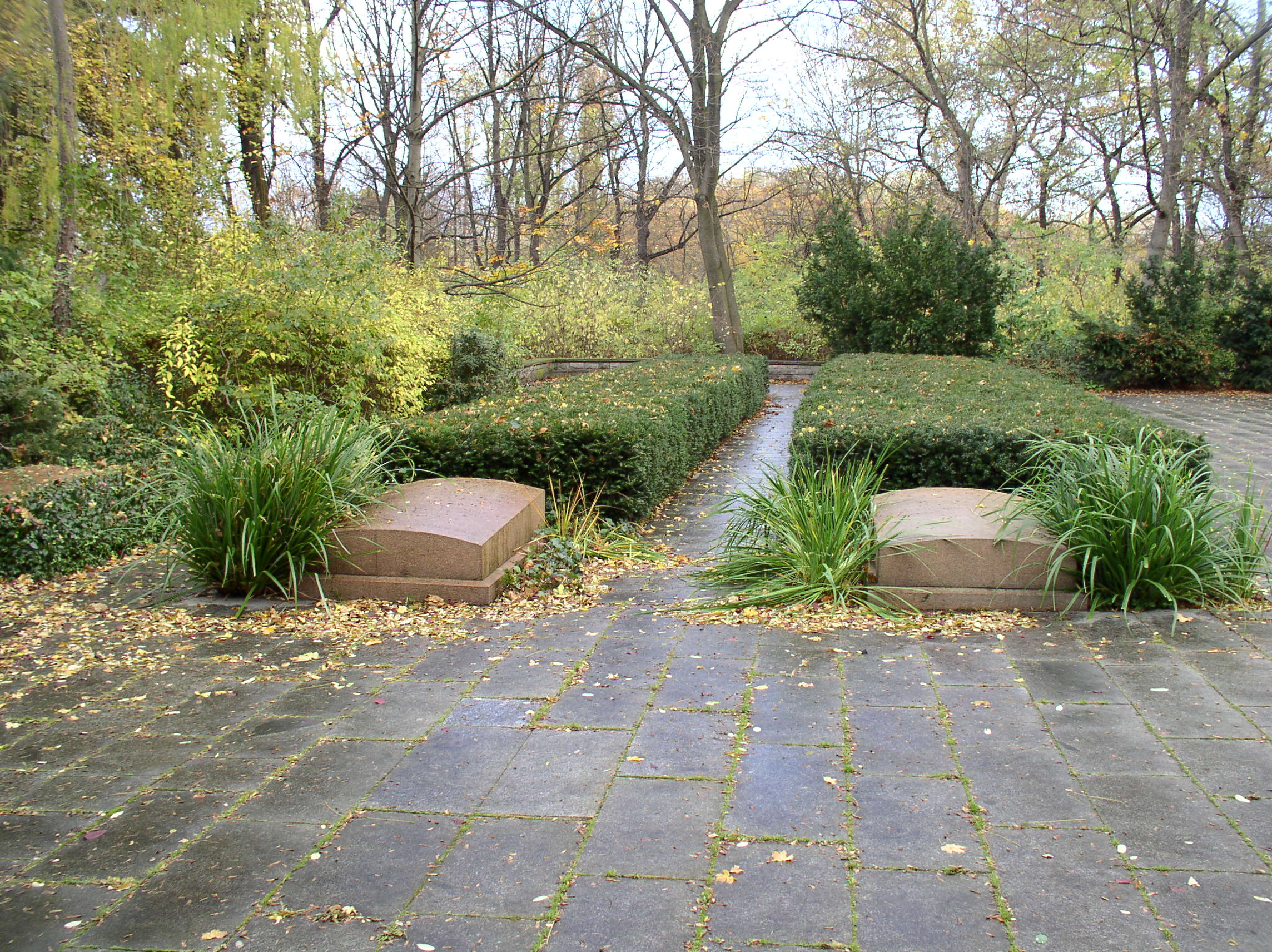 Friedhof der Märzgefallenen, Berlin-Friedrichshain, Germany